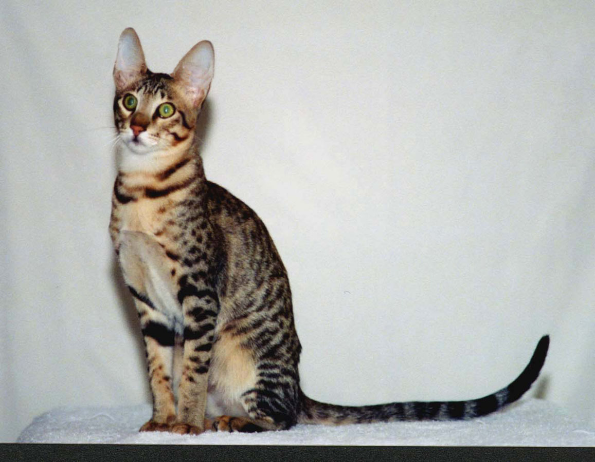 Серенгети.